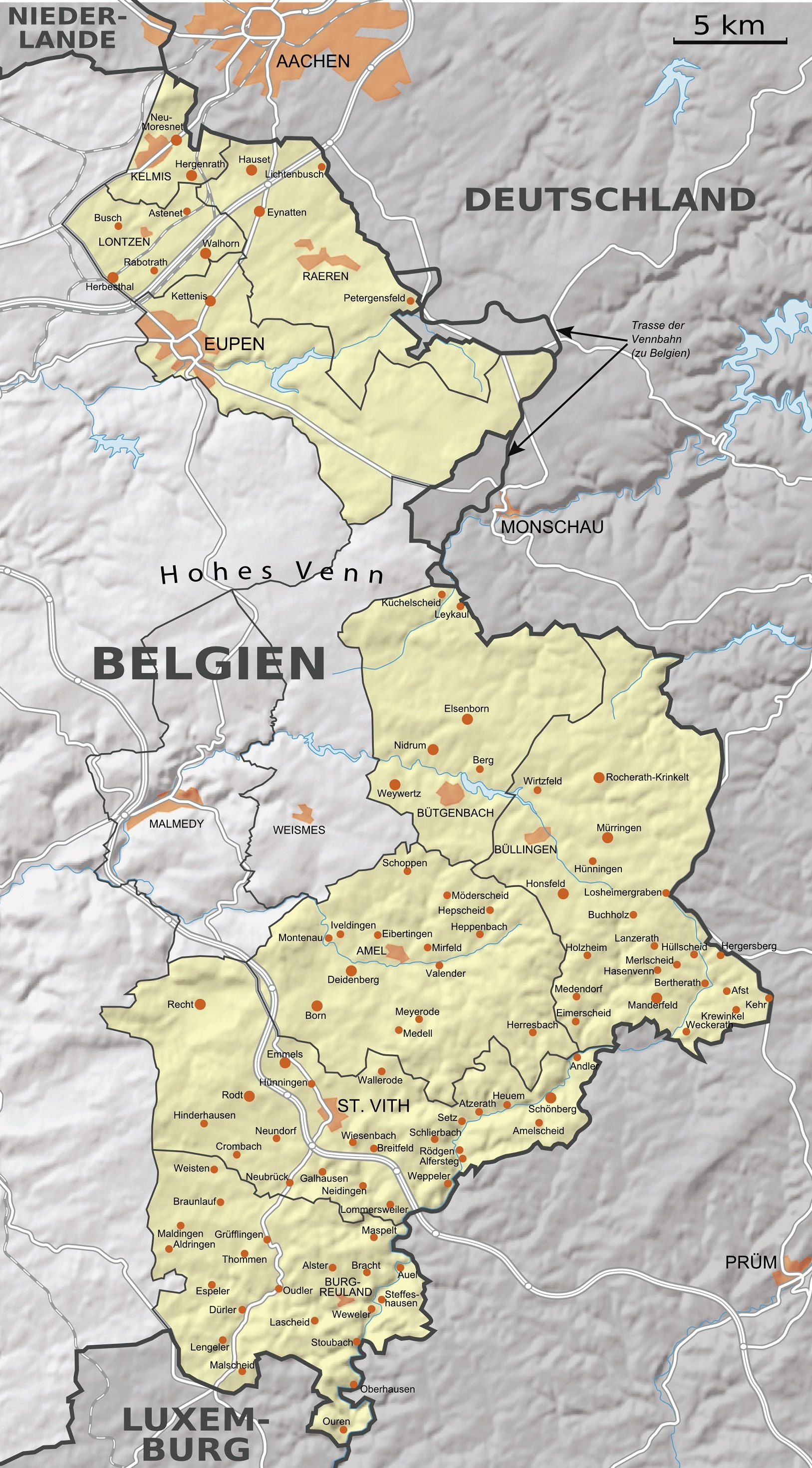 Karte der Gemeinden und Ortsteile der Deutschsprachigen Gemeinschaft